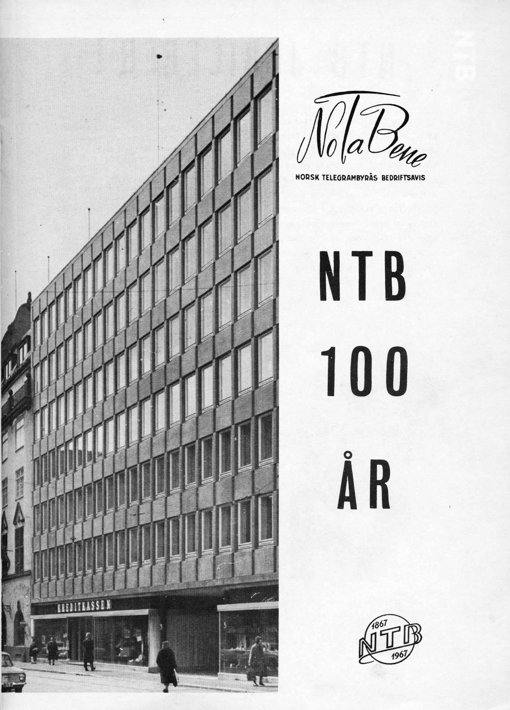 NoTaBene NTB 100 år